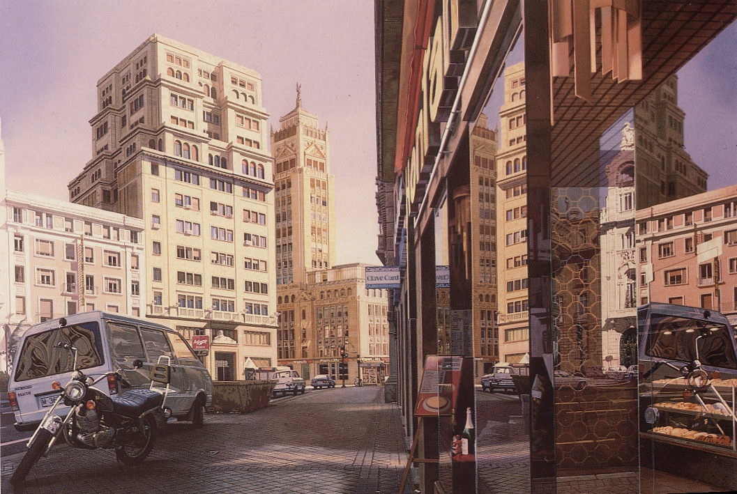 Calle Sevilla desde la cafetería Hontanares hacia Alcalá